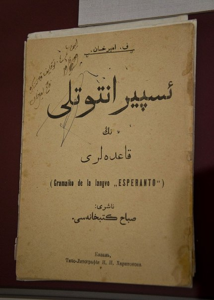 учебник эсперанто на татарском языке с дарственной надписью от Фатиха Амирхана Габдуле Тукаю